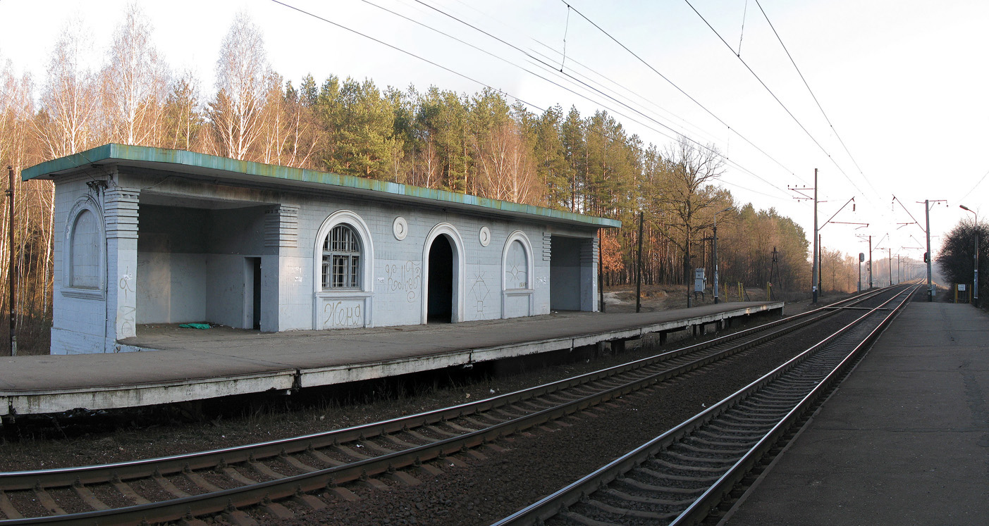 Платформа Малютинка